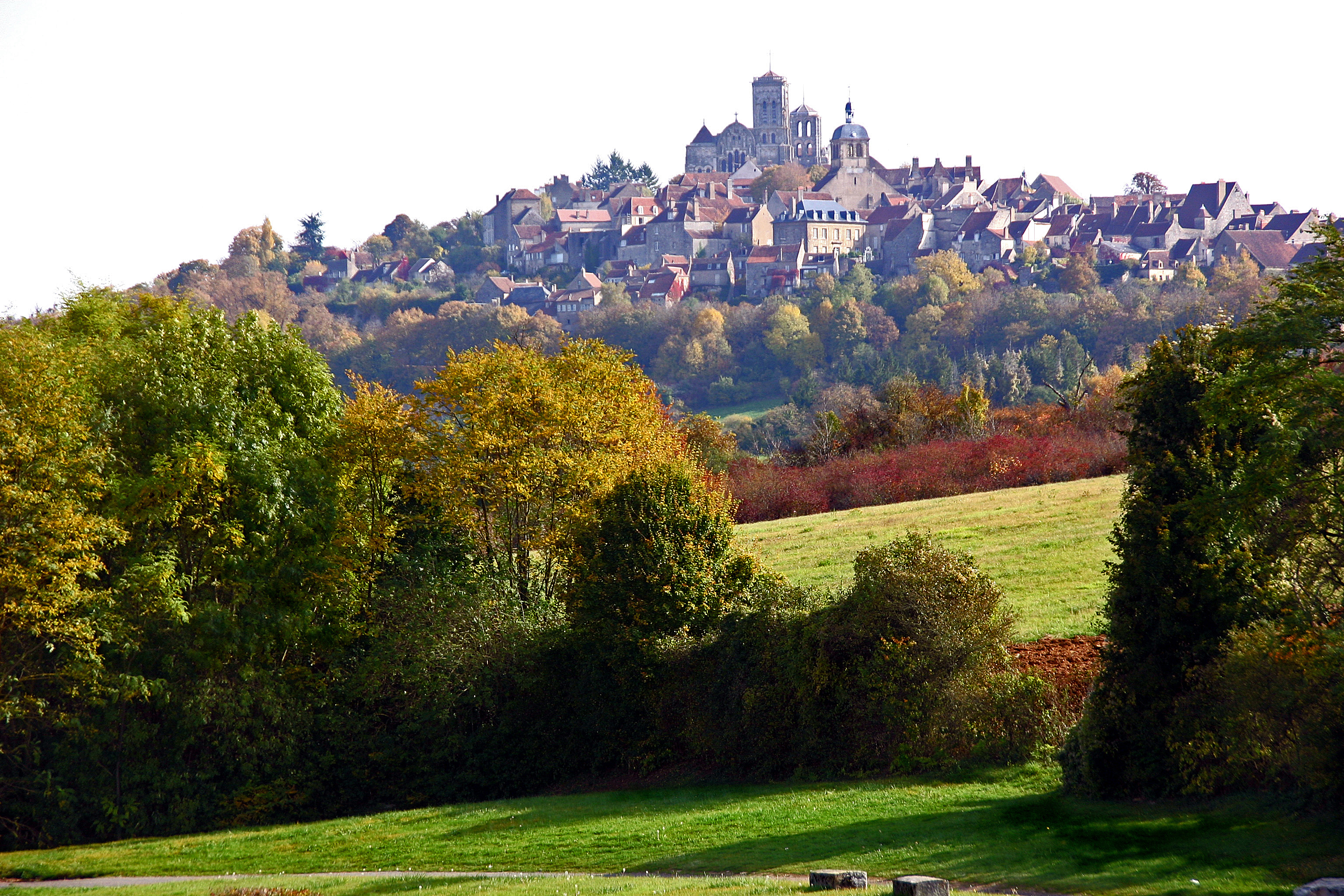 Vézelay in Burgund